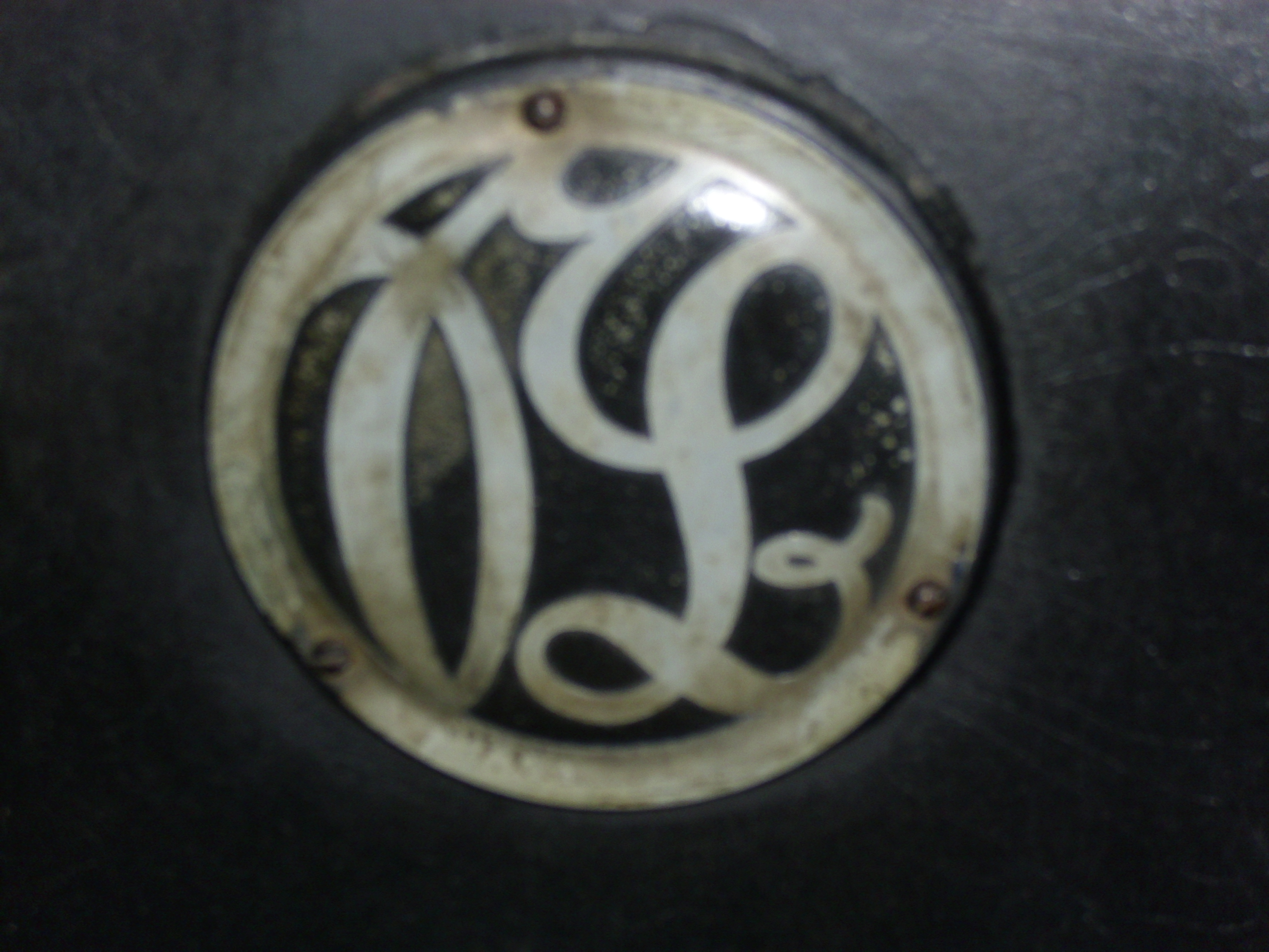 Emblem Slaby-Beringer